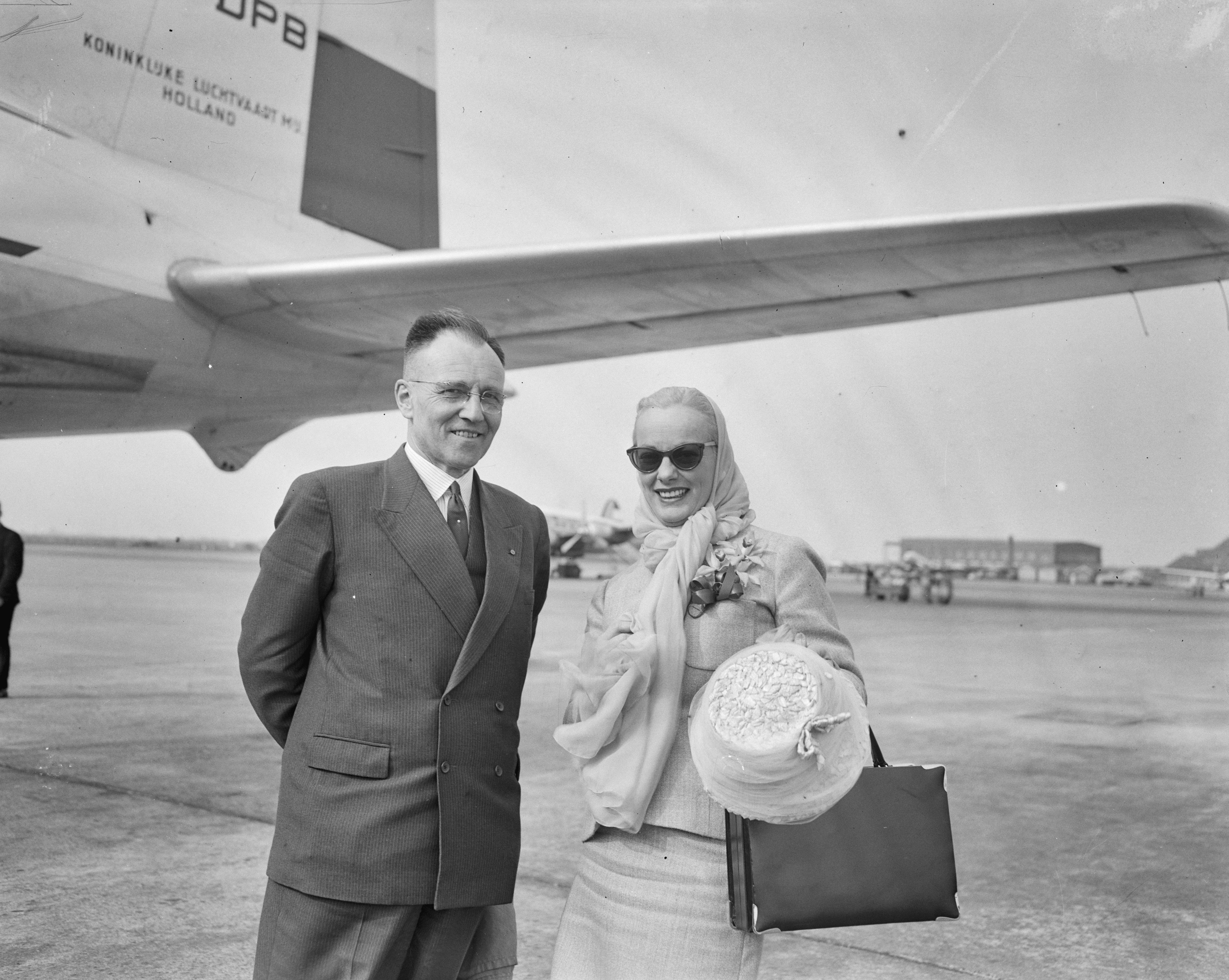 Collectie / Archief : Fotocollectie Anefo Reportage / Serie : [ onbekend ] Beschrijving : Eerste vlucht naar Ankara. Mr. Van der Dussen en Faye Emerson televisiester Datum : 27 april 1956 Persoonsnaam : Emerson, Faye Fotograaf : Pot, Harry / Anefo Auteursrechthebbende : Nationaal Archief Materiaalsoort : Negatief (zwart/wit) Nummer archiefinventaris : bekijk toegang 2.24.01.04 Bestanddeelnummer : 907-7197